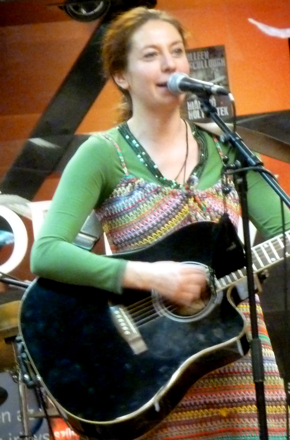 Takáts Eszter a Karcos üdvözlet c. lemezének Alexandra Könyvesház PÓDIUMán (Budapest, Nyugati tér, IV. emelet) tartott bemutatóján.